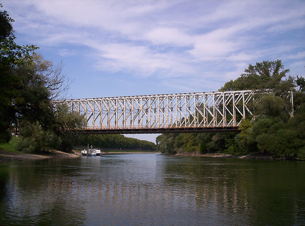 Hajógyári szigeti K híd